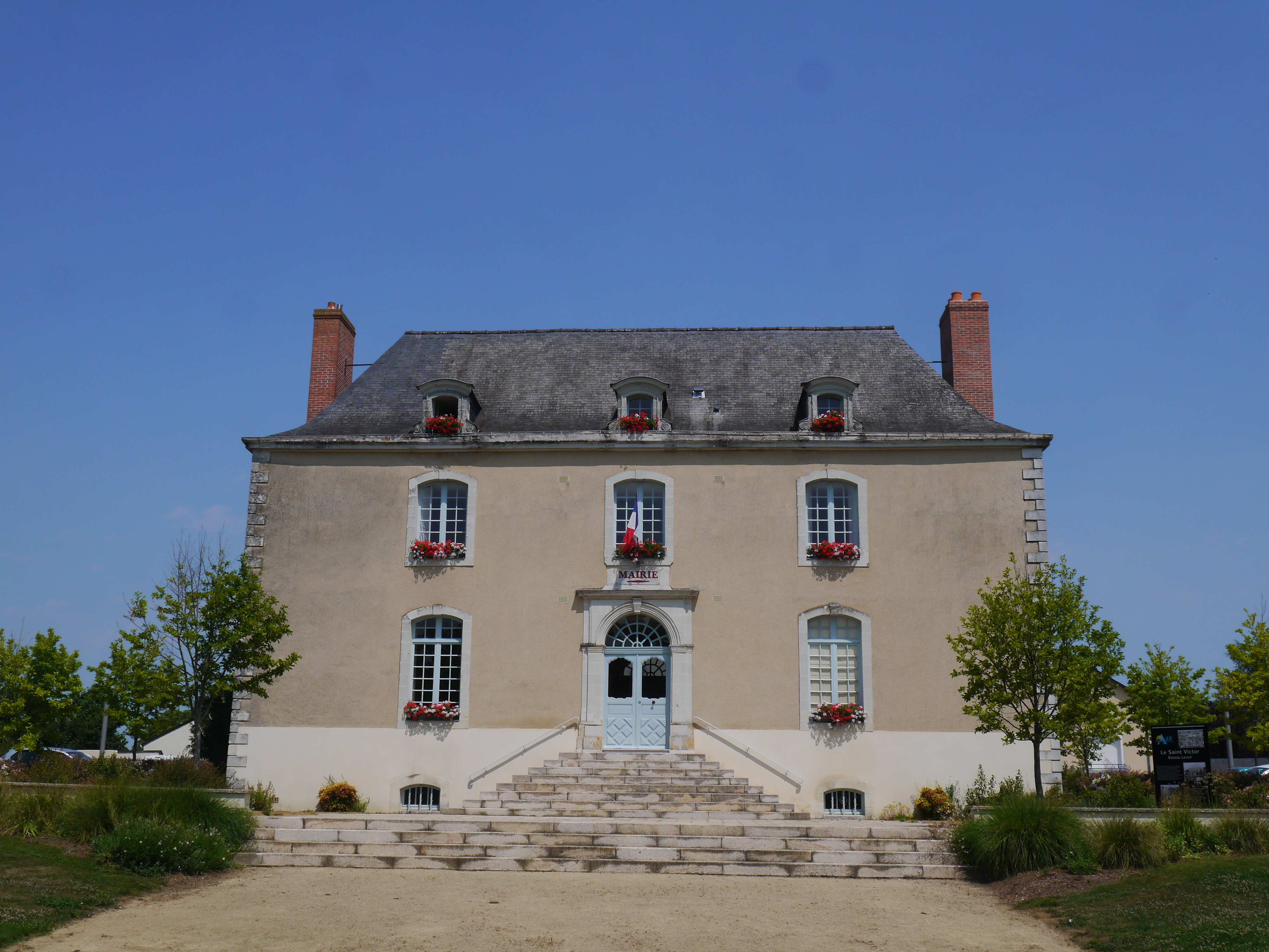 Azé mairie